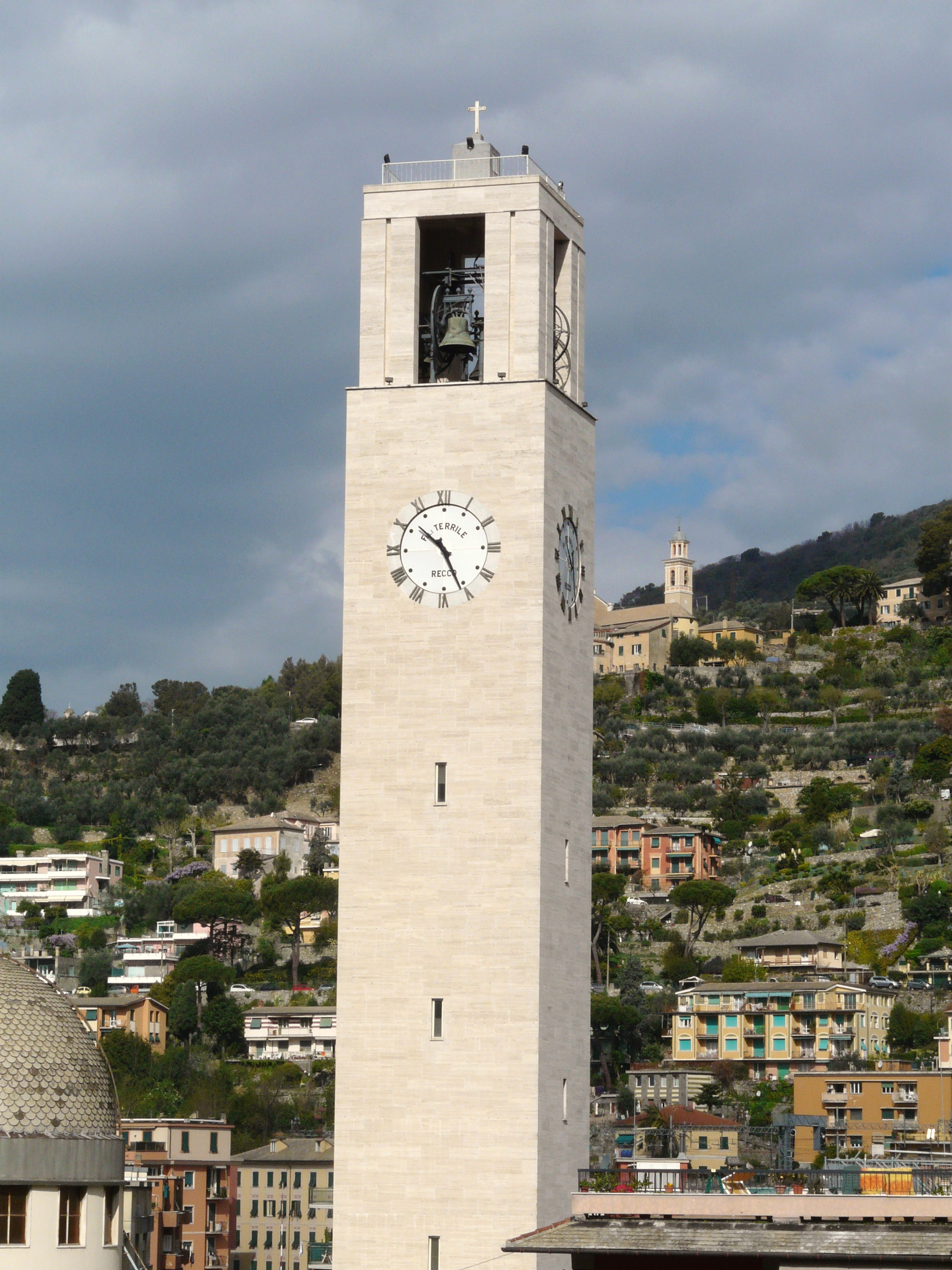 Campanile della chiesa di San Giovanni Bono, Recco, Liguria, Italia